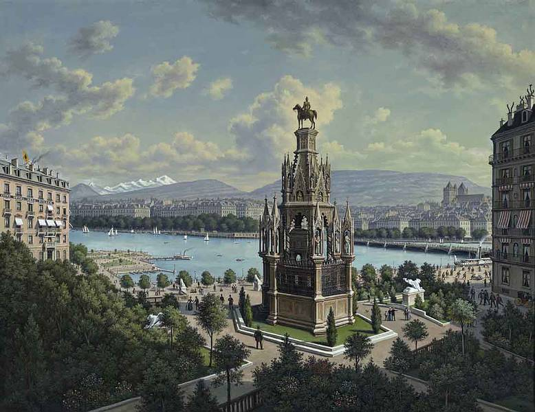 Genf mit der Ermordung der Kaiserin Elisabethtitle QS:P1476,de:"Genf mit der Ermordung der Kaiserin Elisabeth" label QS:Lde,"Genf mit der Ermordung der Kaiserin Elisabeth"